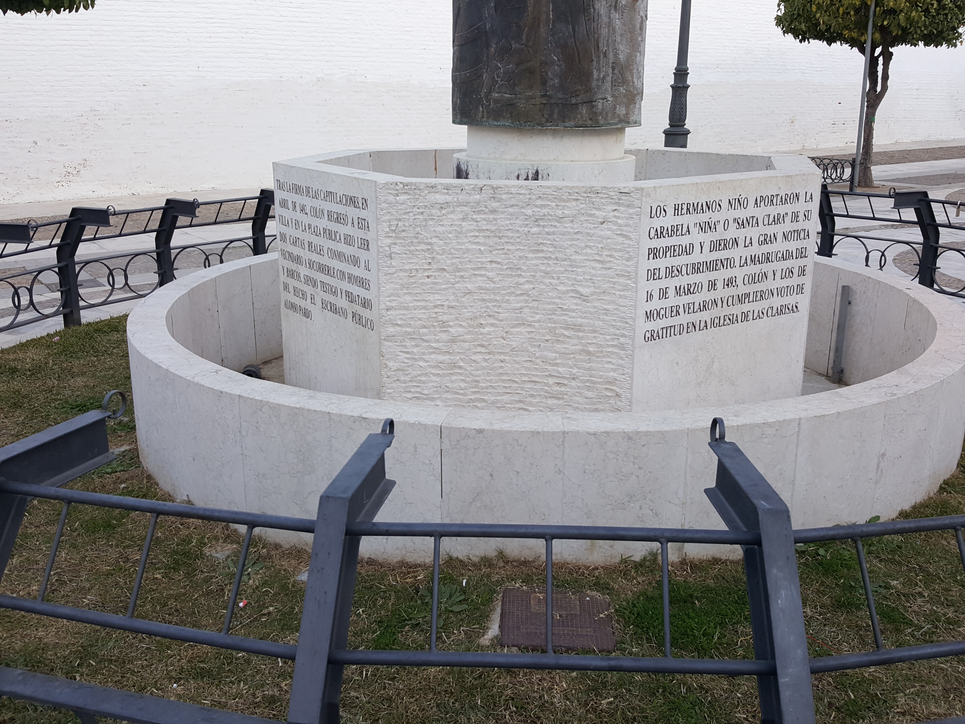 Monumento a Cristóbal Colón en Moguer Andalucía (España). Fuente.